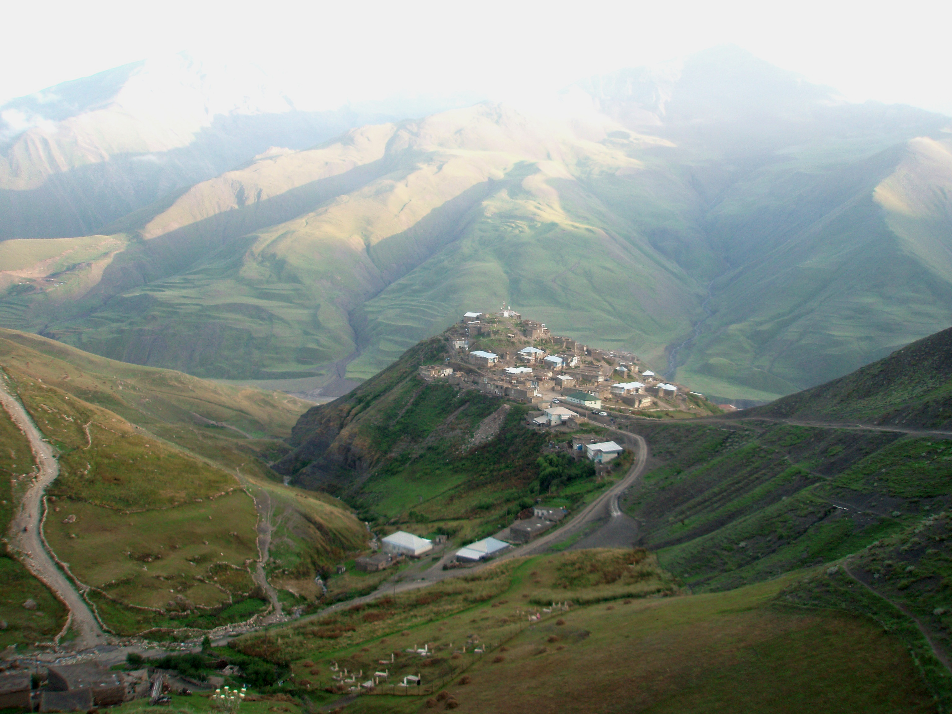 Xınalıq, avqust 2009